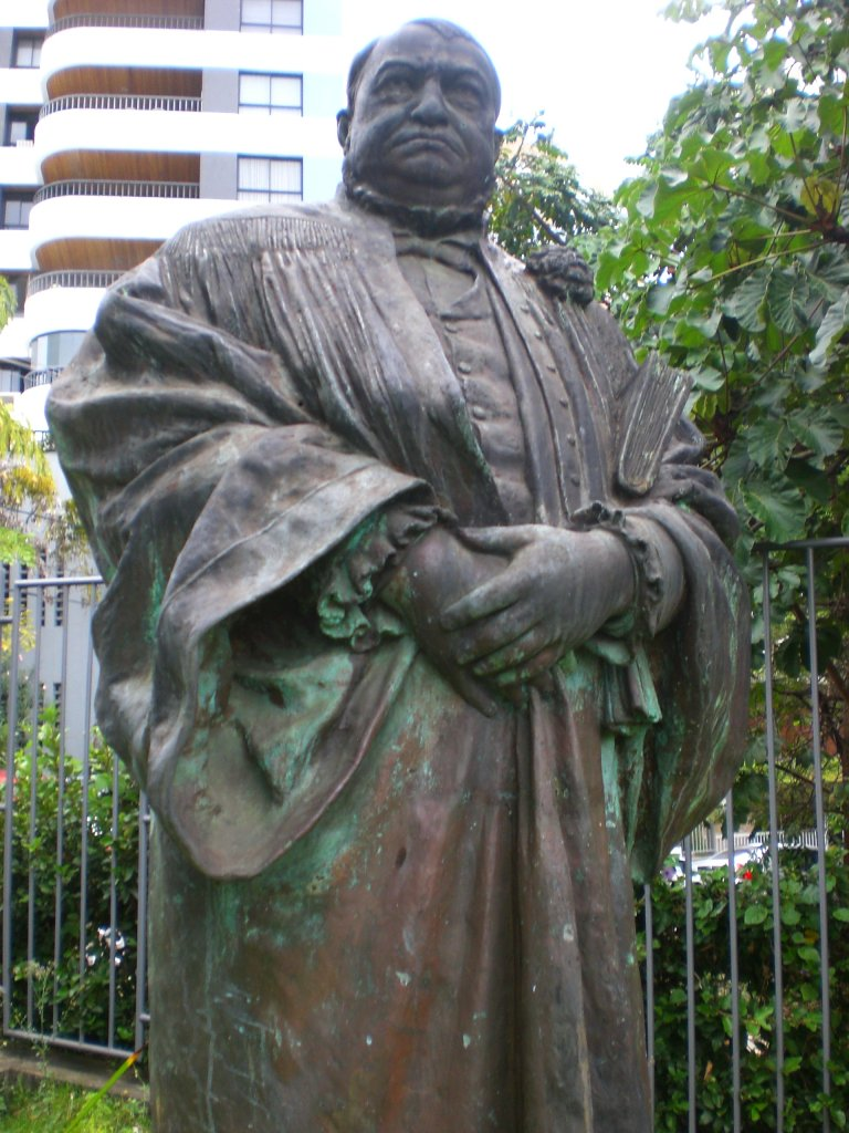 Estátua de Augusto Teixeira de Freitas, na Faculdade de Direito da UFBa, rua da Paz, Graça - Salvador, Bahia.